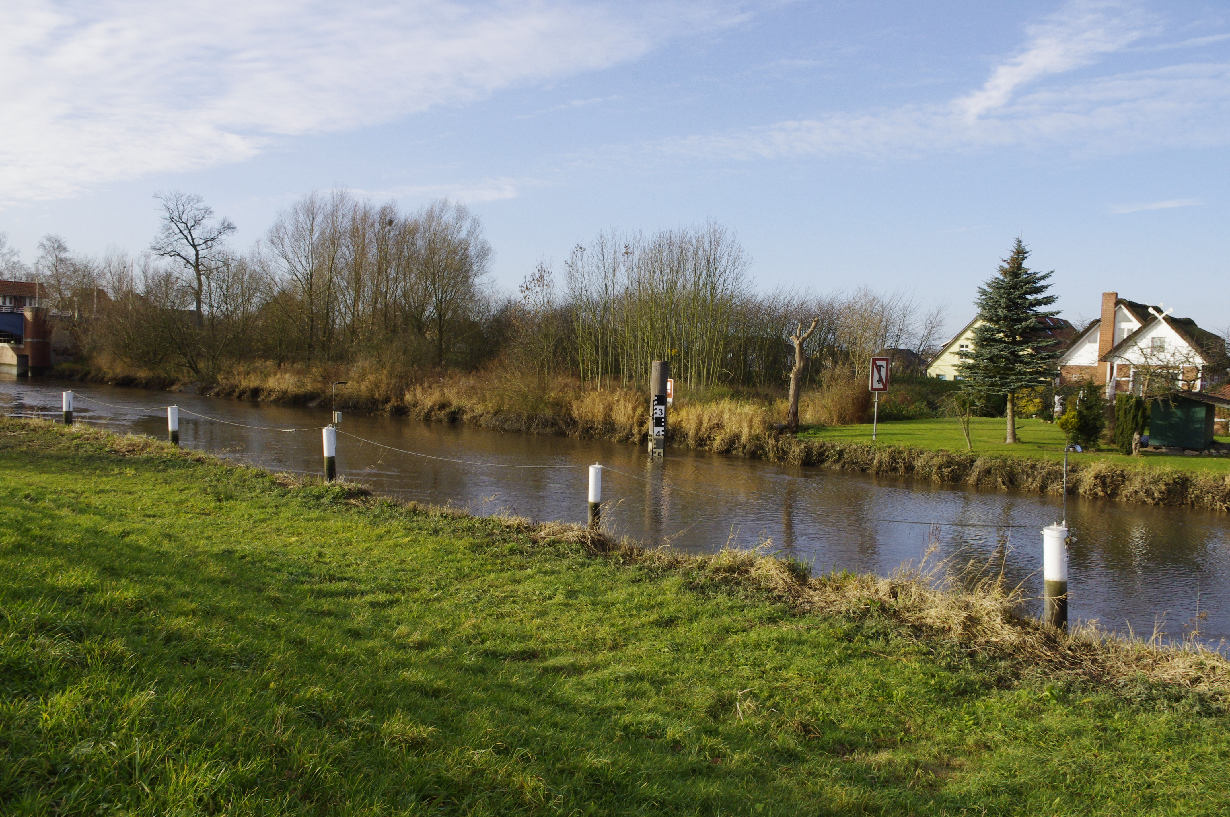 Este in Groß Hove, Jork